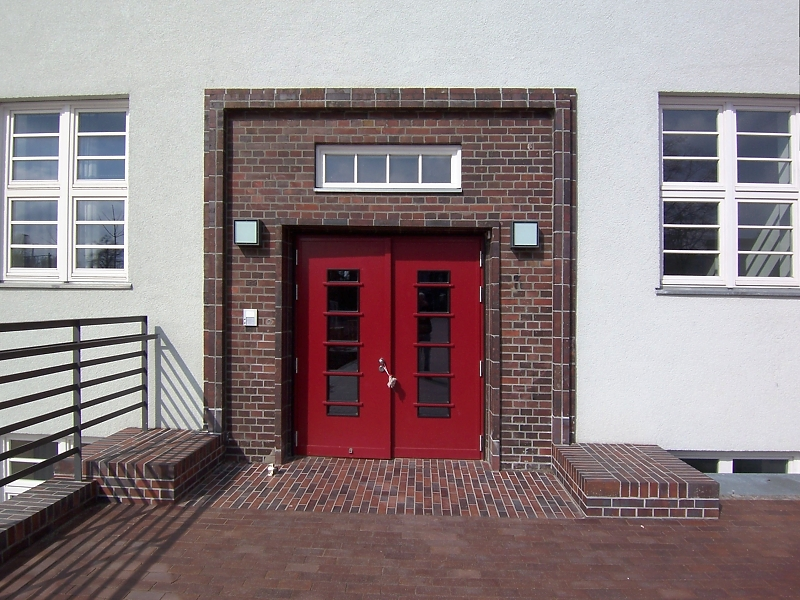 Innerstädtischen Gymnasium in Rostock, Eingang des Ostflügels